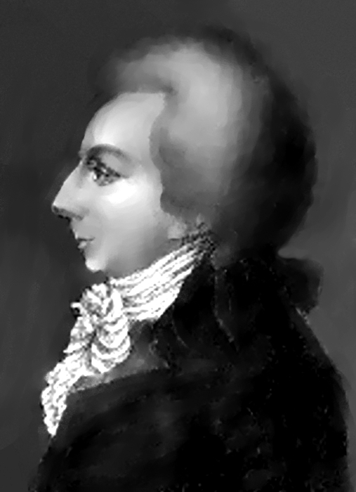 Le Peletier (modified picture Le Peletier 1770-1845.jpg from Commons)